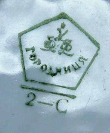 Клеймо Городницького фарфорового заводу. Клеймо зеленого кольору відповідає 2 сорту, 50-ті роки ХХ ст.. на цукорниці.